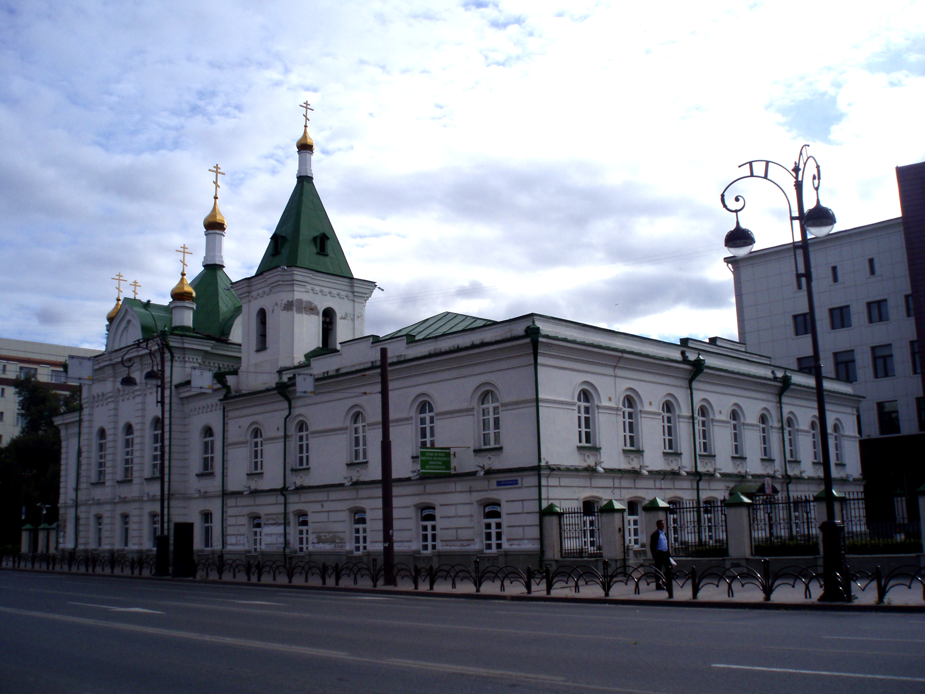 Здание Владимирского сиропитательного заведения (Тюменская область, Тюмень, Республики улица, 50)